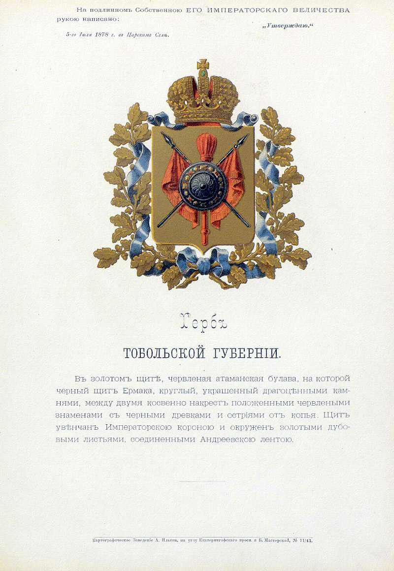 Official Russian Empire coat of arms Tobolsk Governorate. Герб Российской Империи Тобольской губернии с официальным описанием в Гербовнике Бенке. Утверждён Императором Всероссийским Александром Вторым.